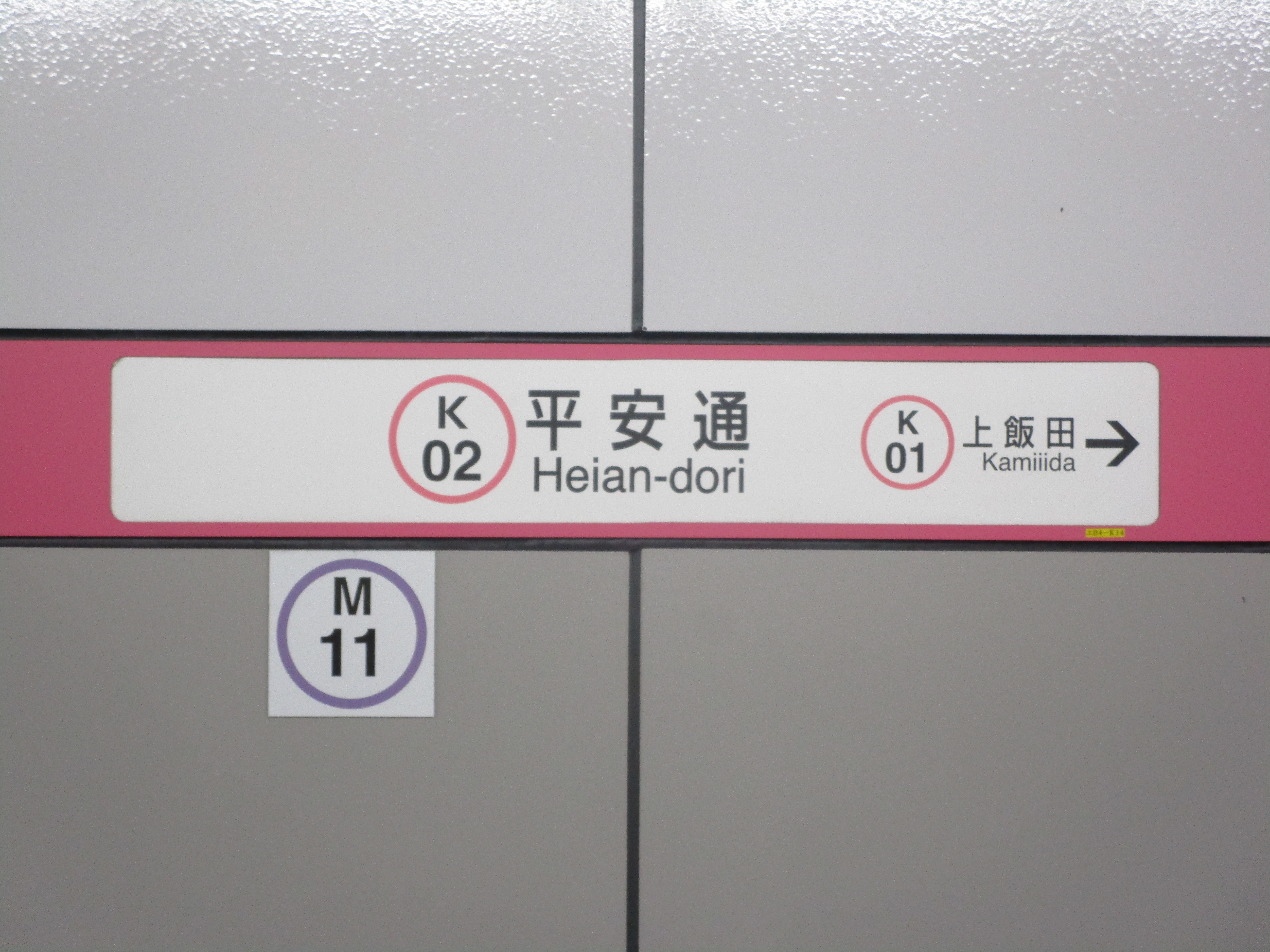 上飯田線平安通駅の駅名標